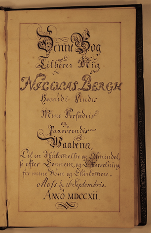 Armorial of Nicolas Bergh from 1712